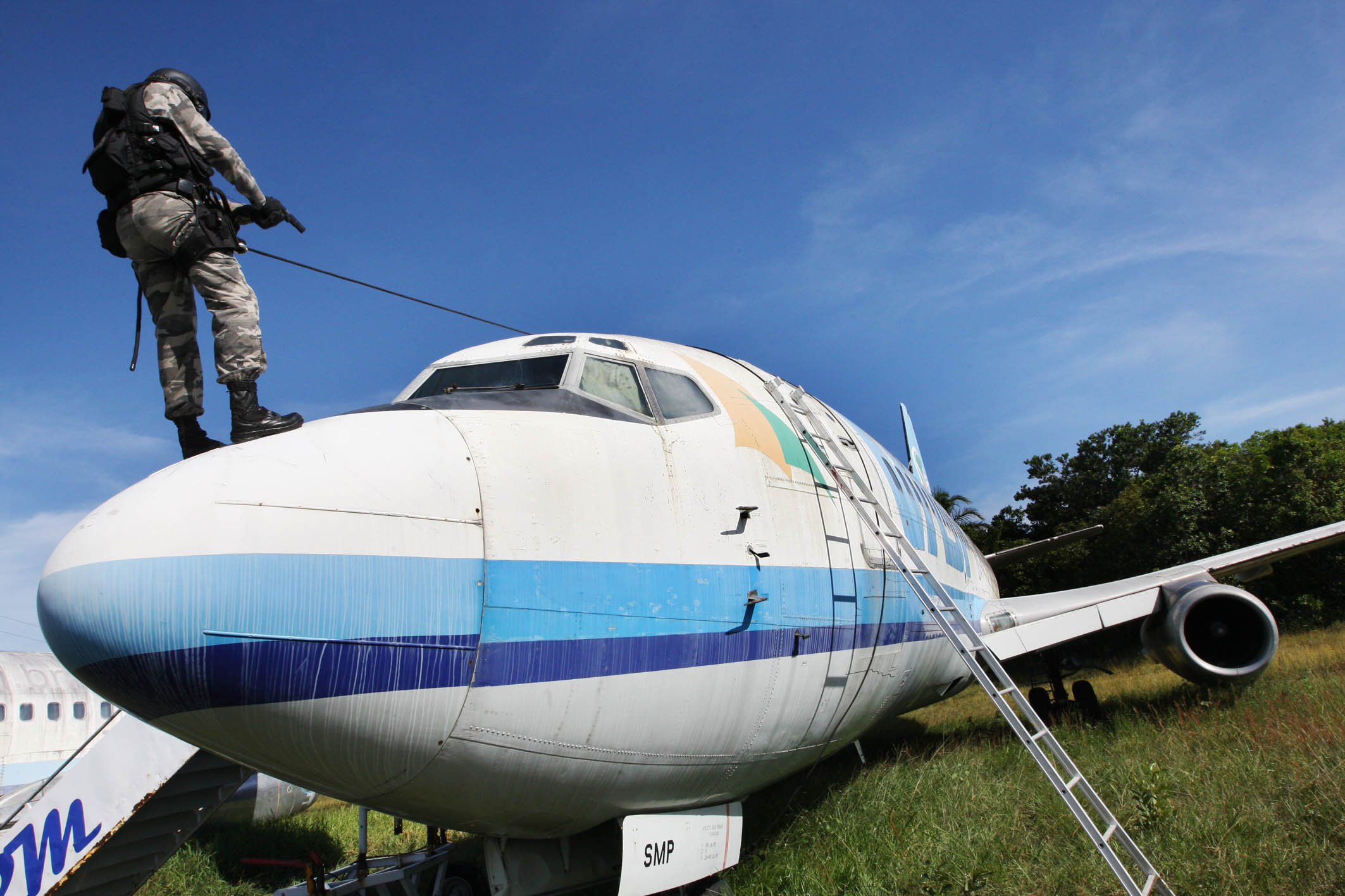 COE realiza simulação de ocorrência terrorista em aeronave A Polícia Militar da Bahia, por meio da Companhia de Operações Especiais do Batalhão de Choque (COE), realiza esse curso para os policiais, onde além dessa simulação prática, oferece também disciplinas sobre direitos humanos, ações anti-bomba, ações táticas especiais, paraquedismo policial entre outras. Foto: Mateus Pereira/Secom